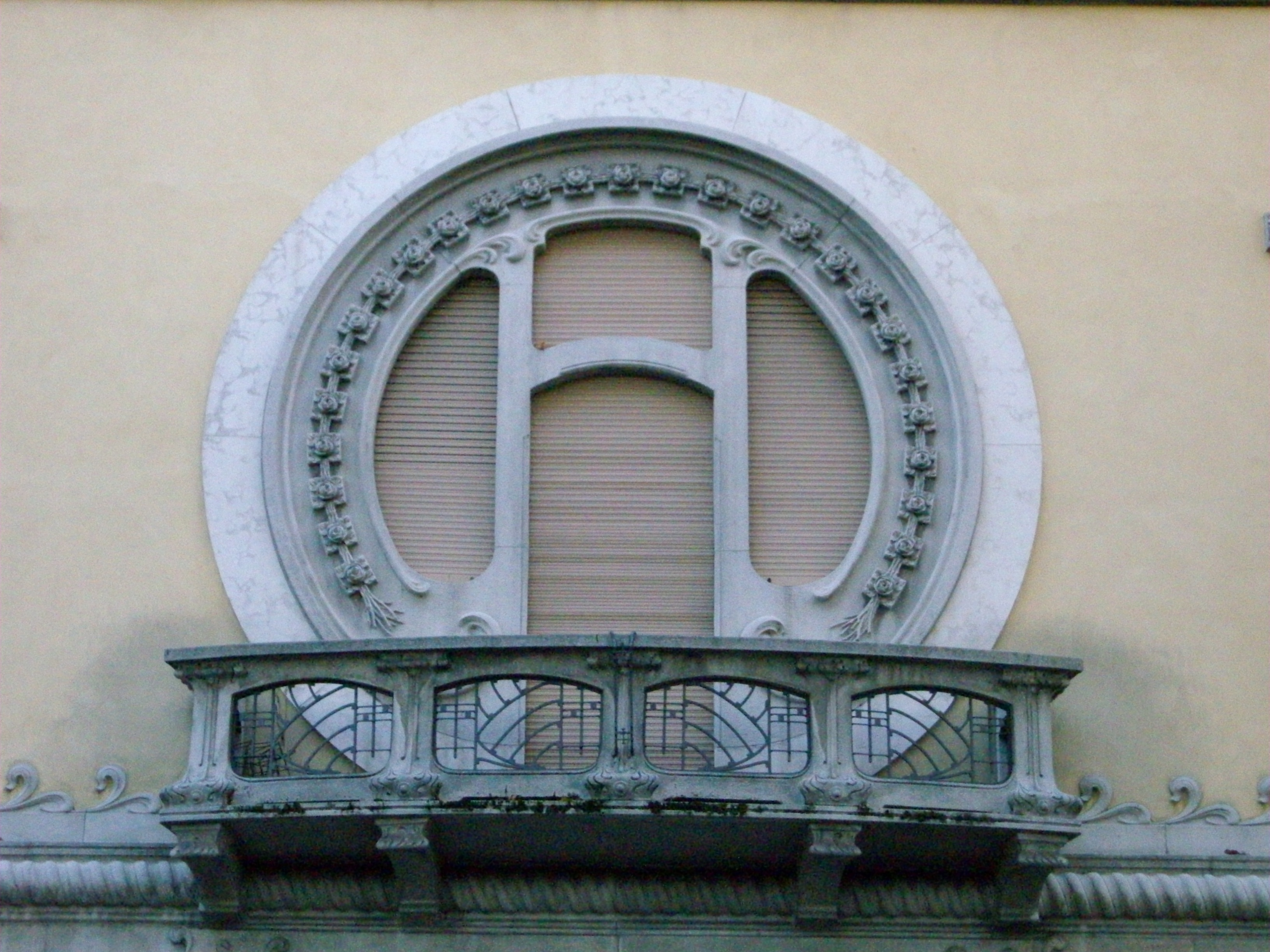 Particolare della facciata